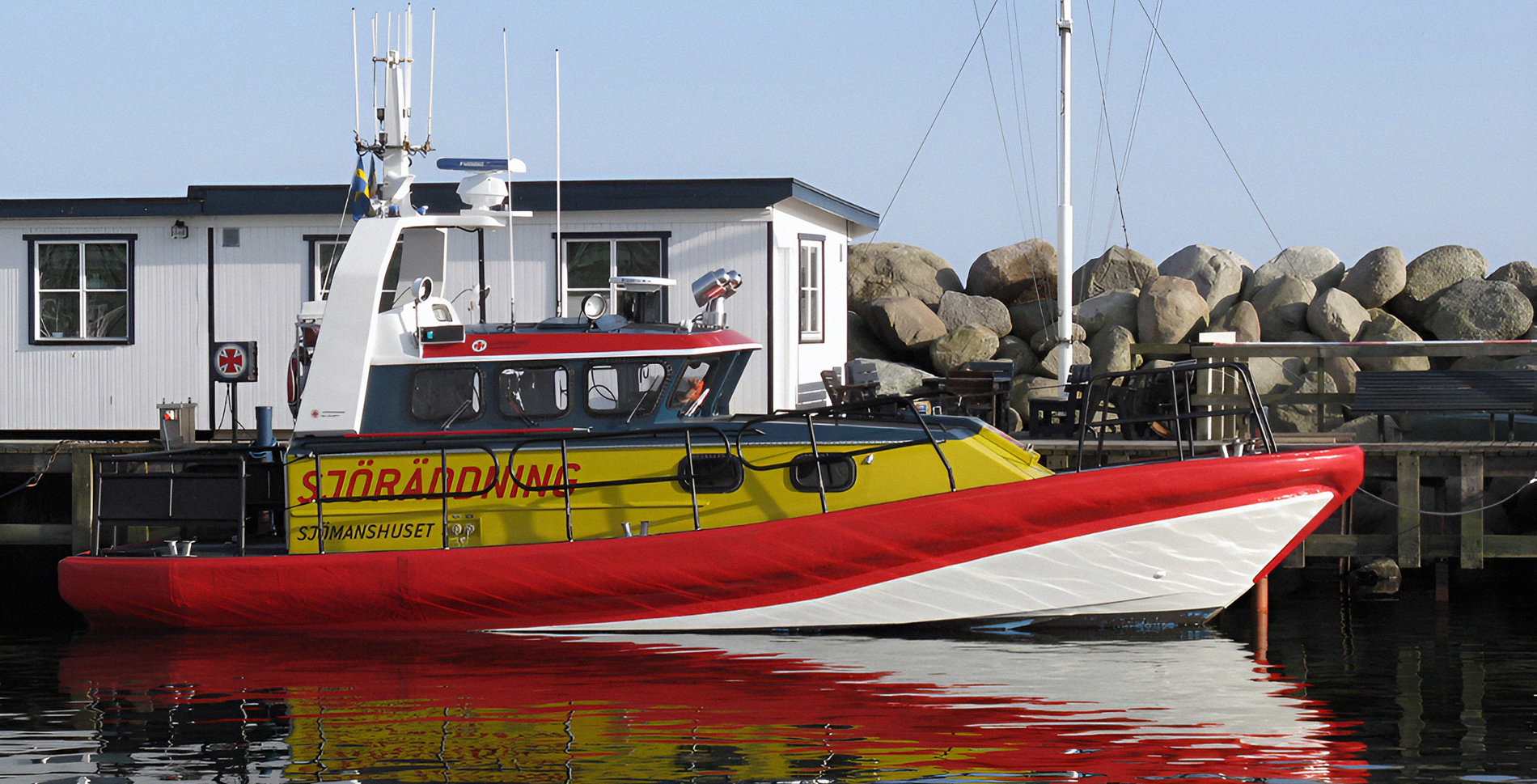 Sjömanshuset. Sjöräddningen i Ystads båt.